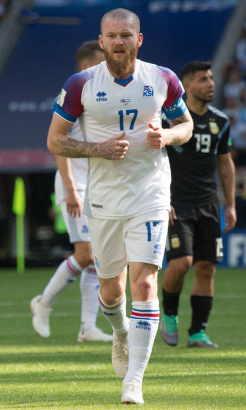 Месси и Ко не смогли обыграть неуступчивых исландцев